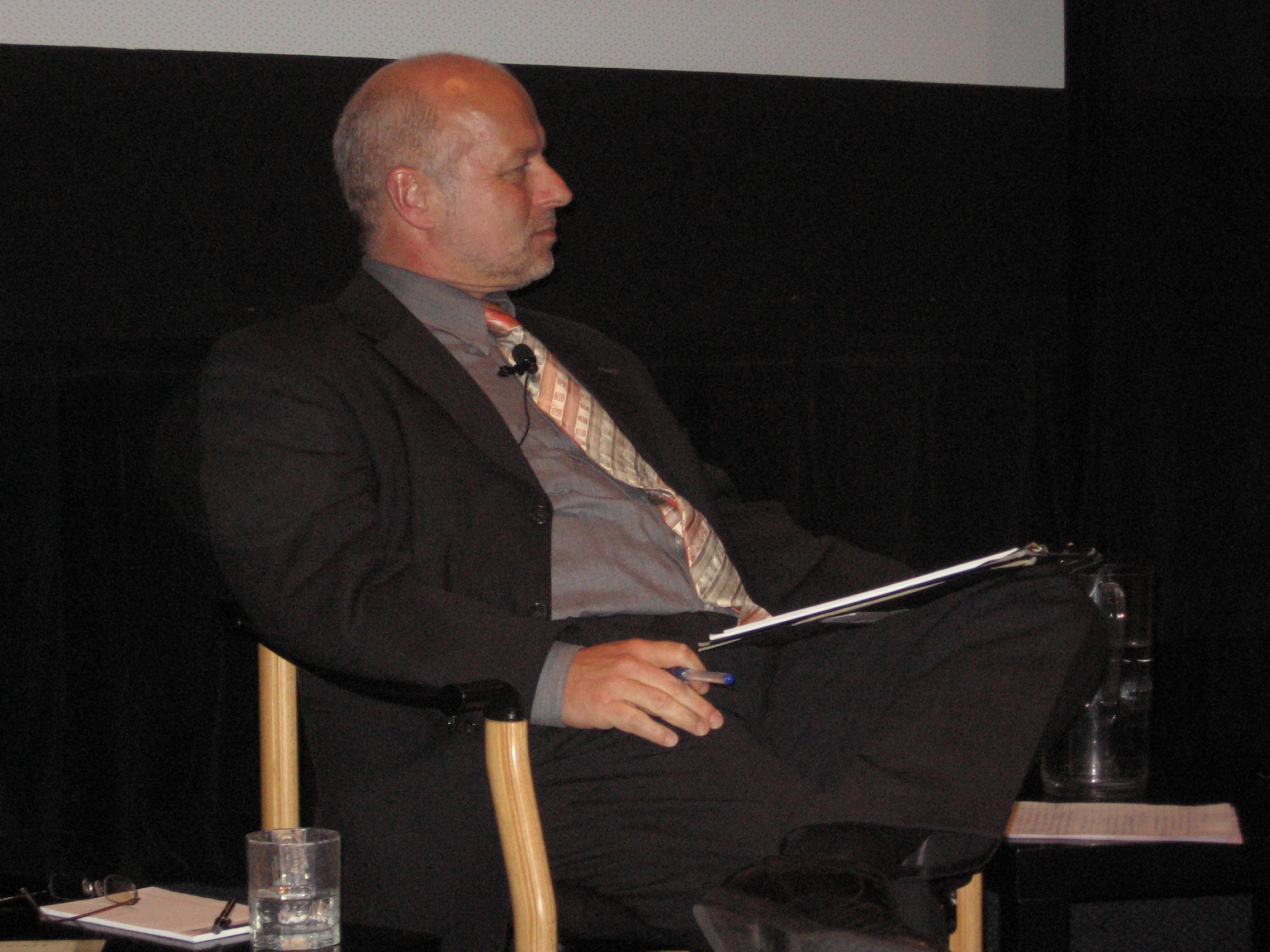 Diskussionsveranstaltung im Goethe-Institut Washington DC, 2007